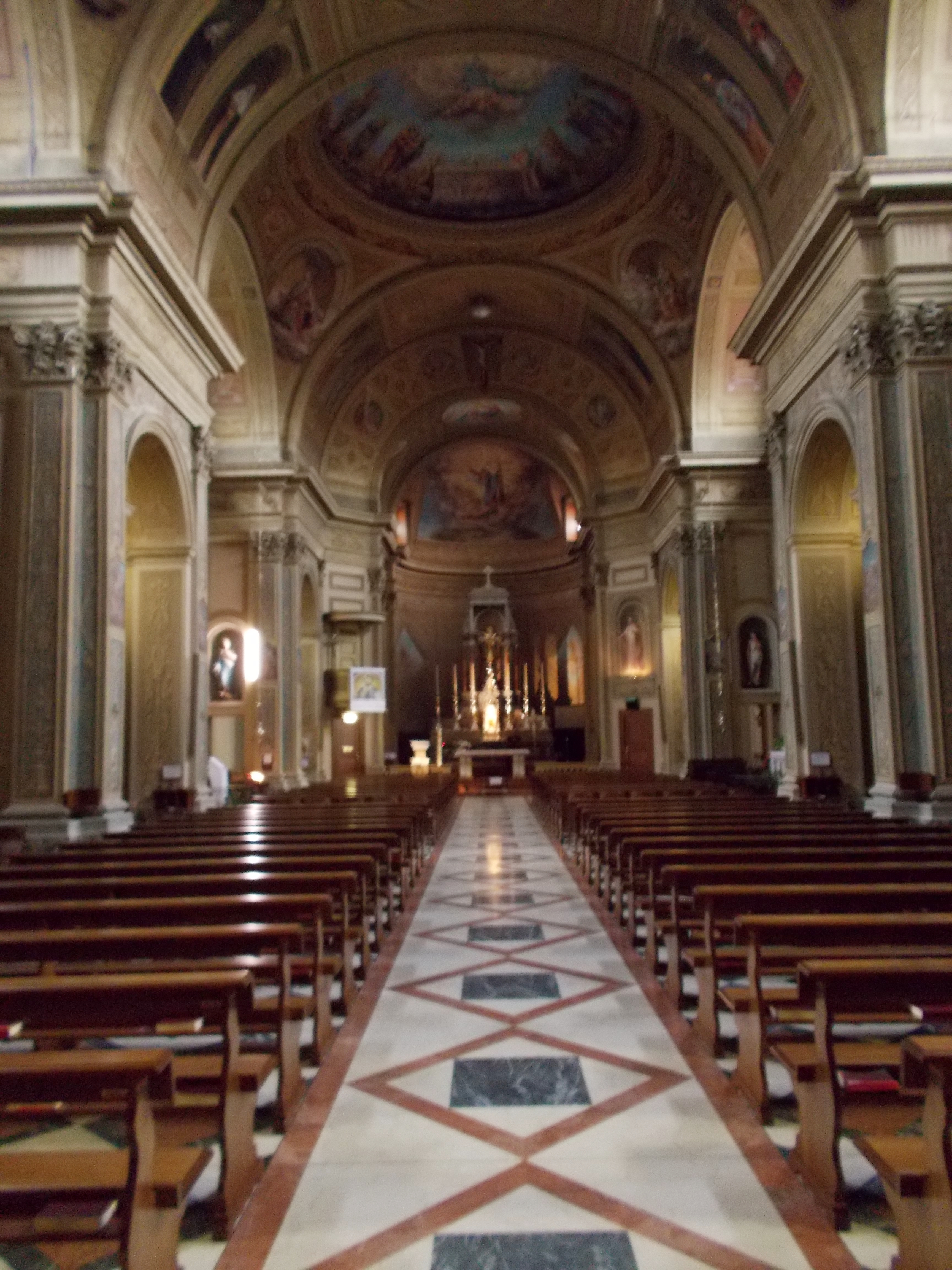 Interno della chiesa dei Santi Cornelio e Cipriano a Carnate